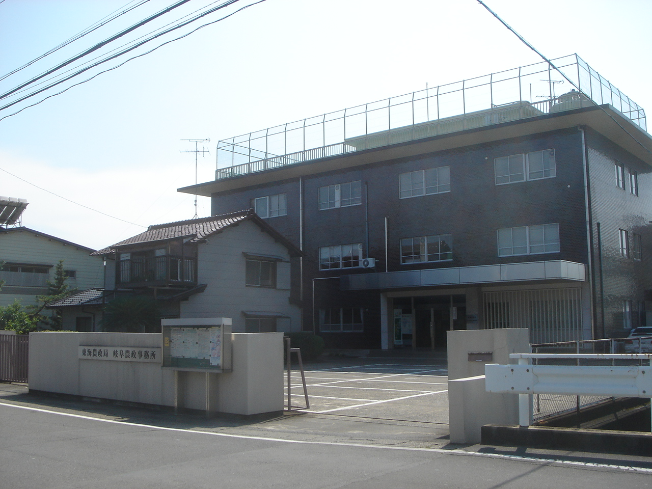 Tokai-Nosekyoku office in Gifu Pref.（岐阜農政事務所）,Gifu,Gifu,Japan(岐阜県岐阜市)で撮影。